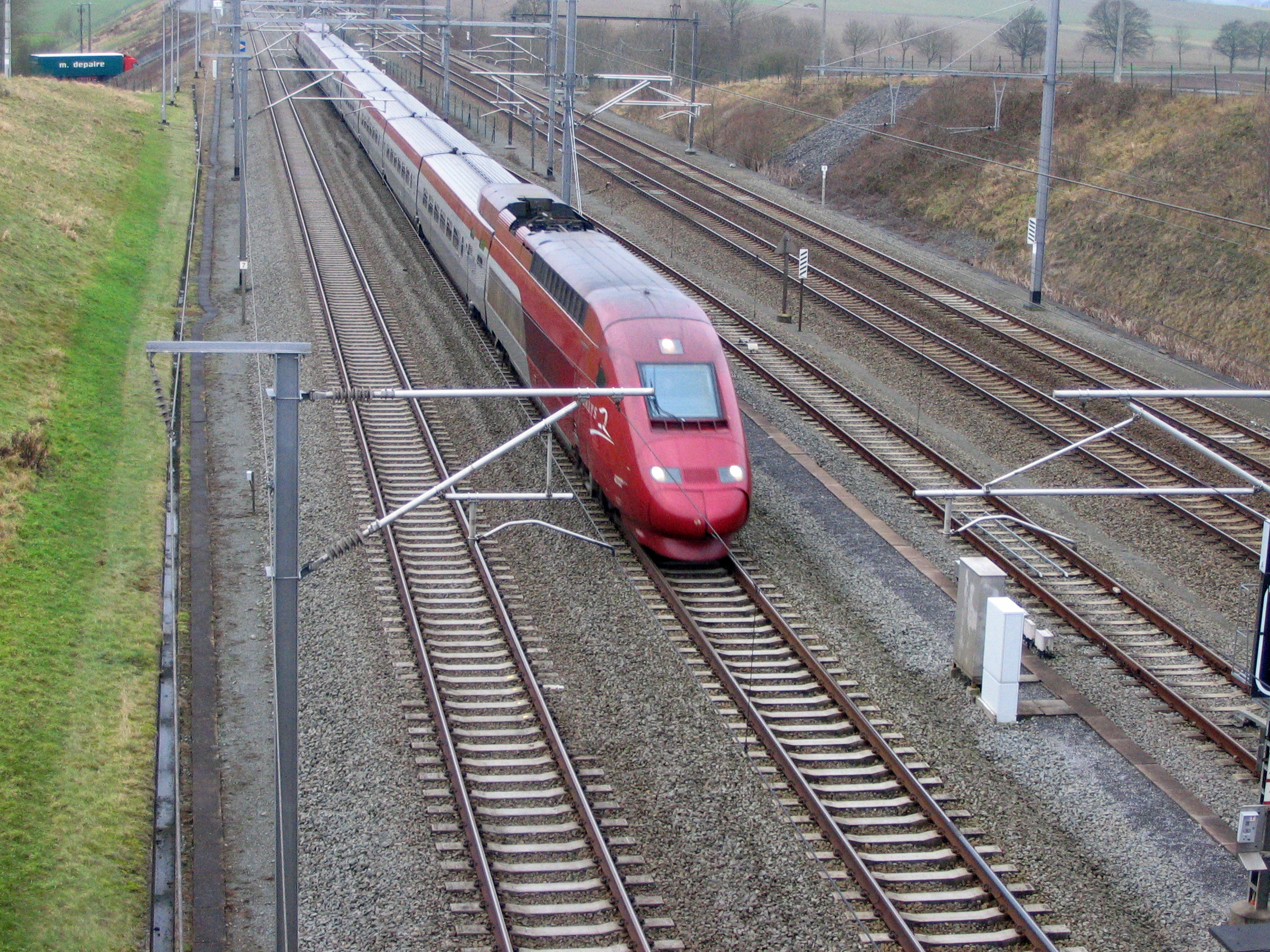 Rame Thalys parcourant la campagne wallonne à pleine vitesse.